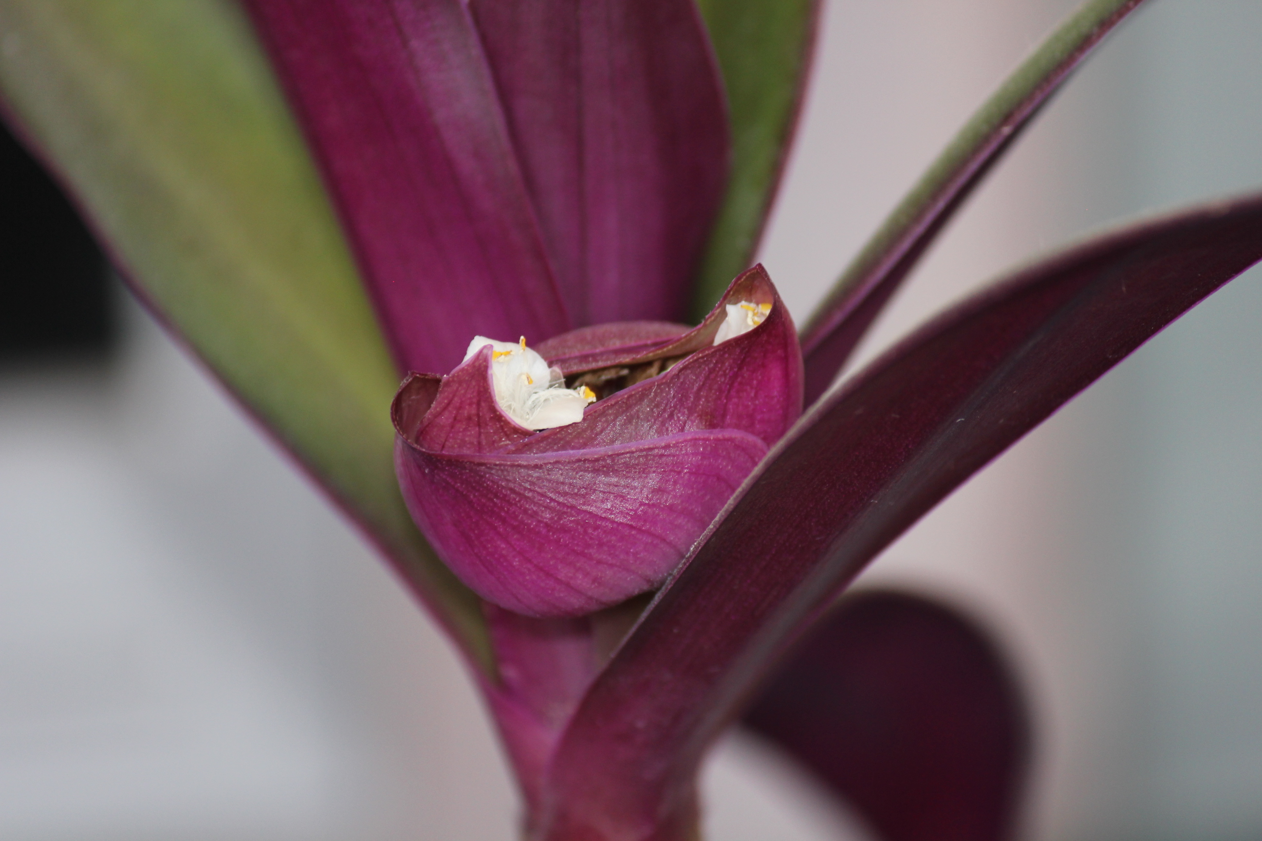 Цветок Рэо мелкий белого цвета, заключенный в «лодочку-покрывало»